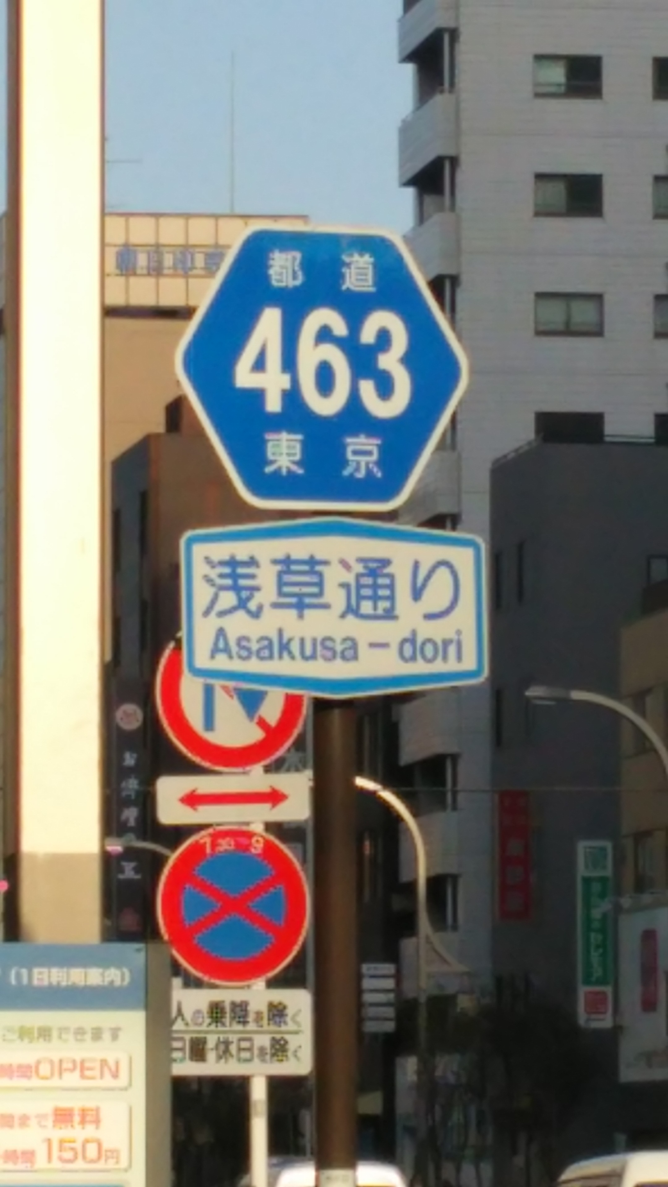 東京都道463号 台東区にて